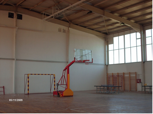 Училишната сала внатре.